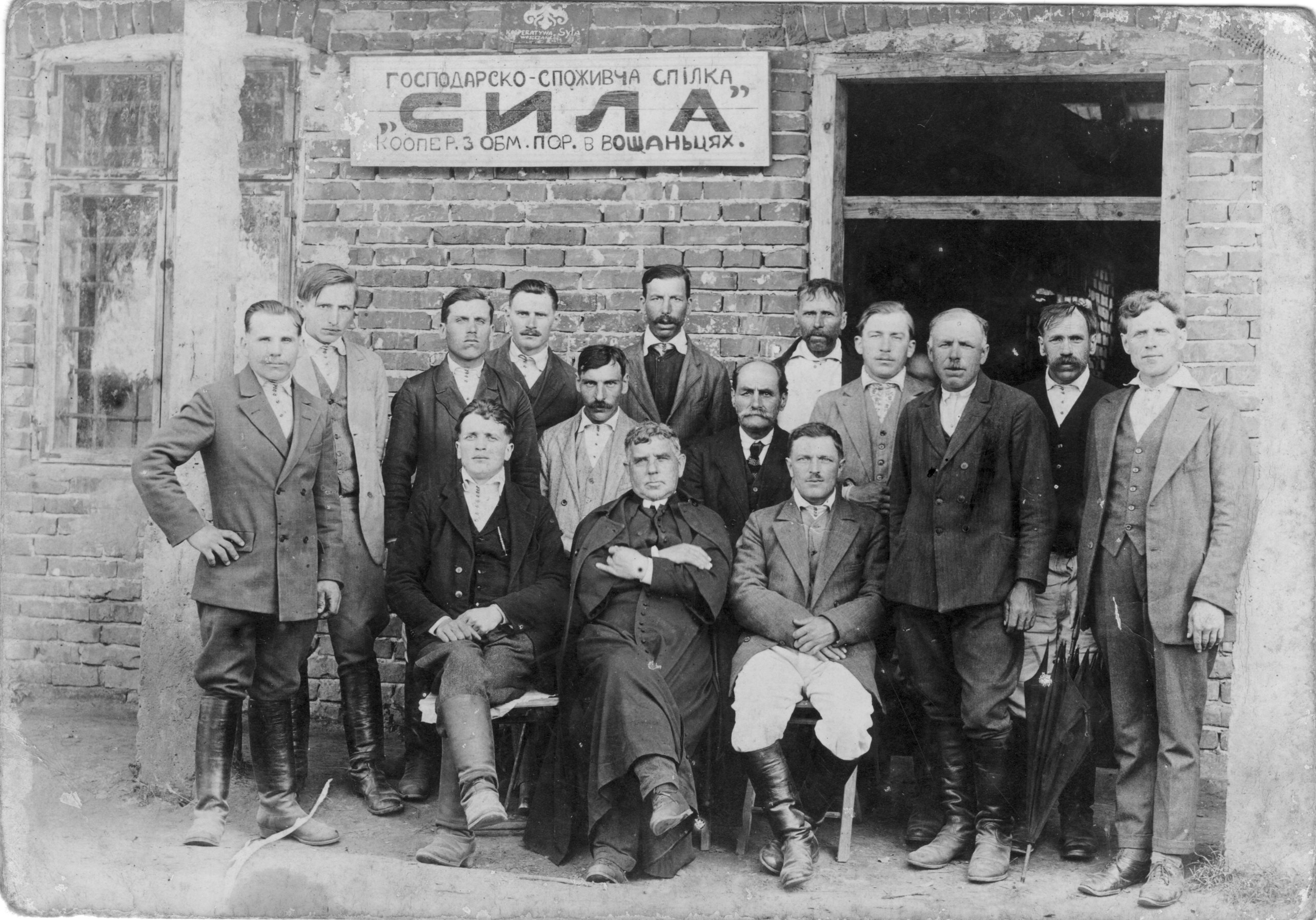 Члени господарсько-споживчої спілки "Сила" в селі Вощанці (тепер Самбірського району Львівської області), кін. ХІХ ст.